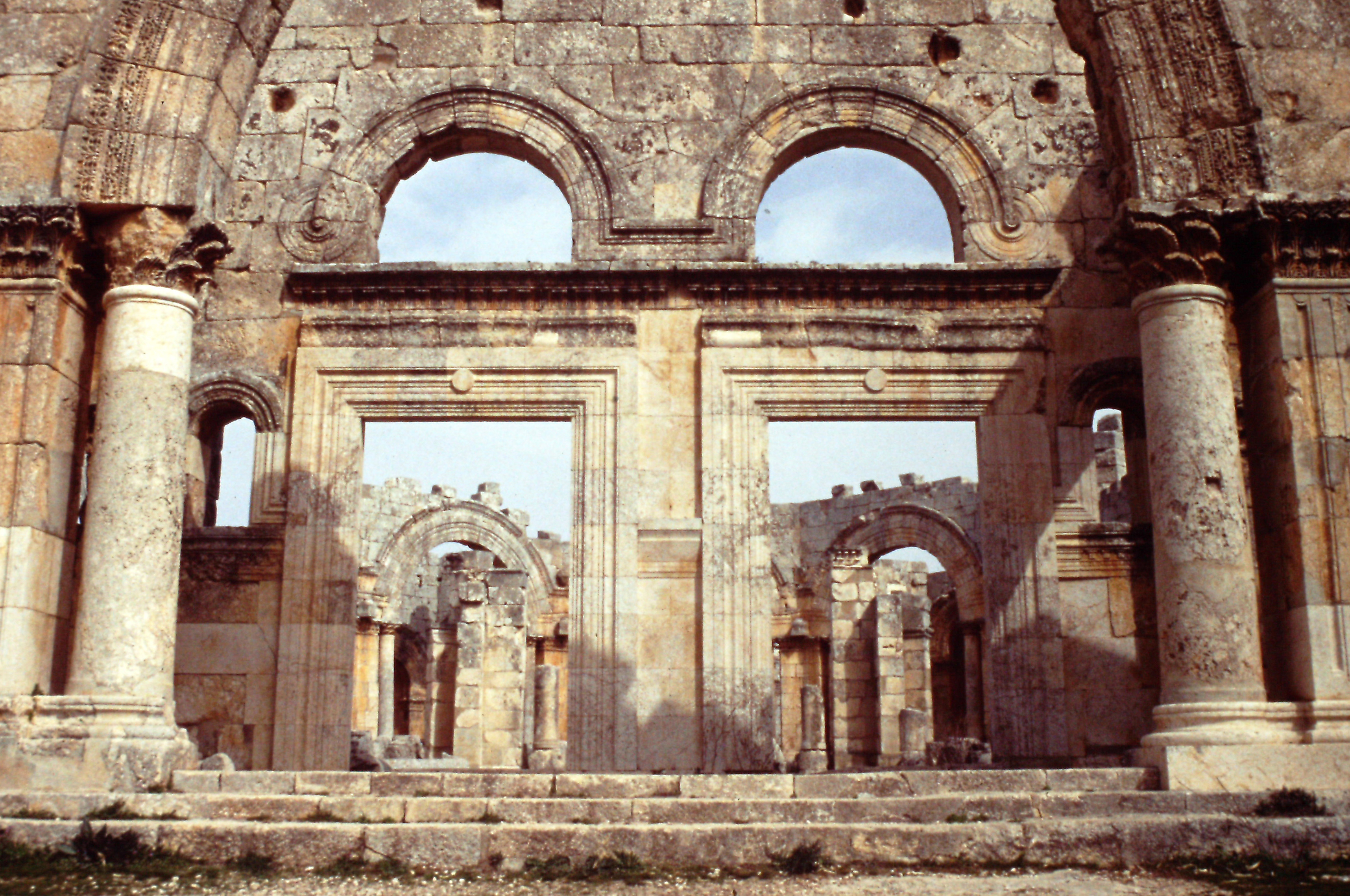 Santuario di San Simeone stilita, grande basilica, il nartece dalla facciata